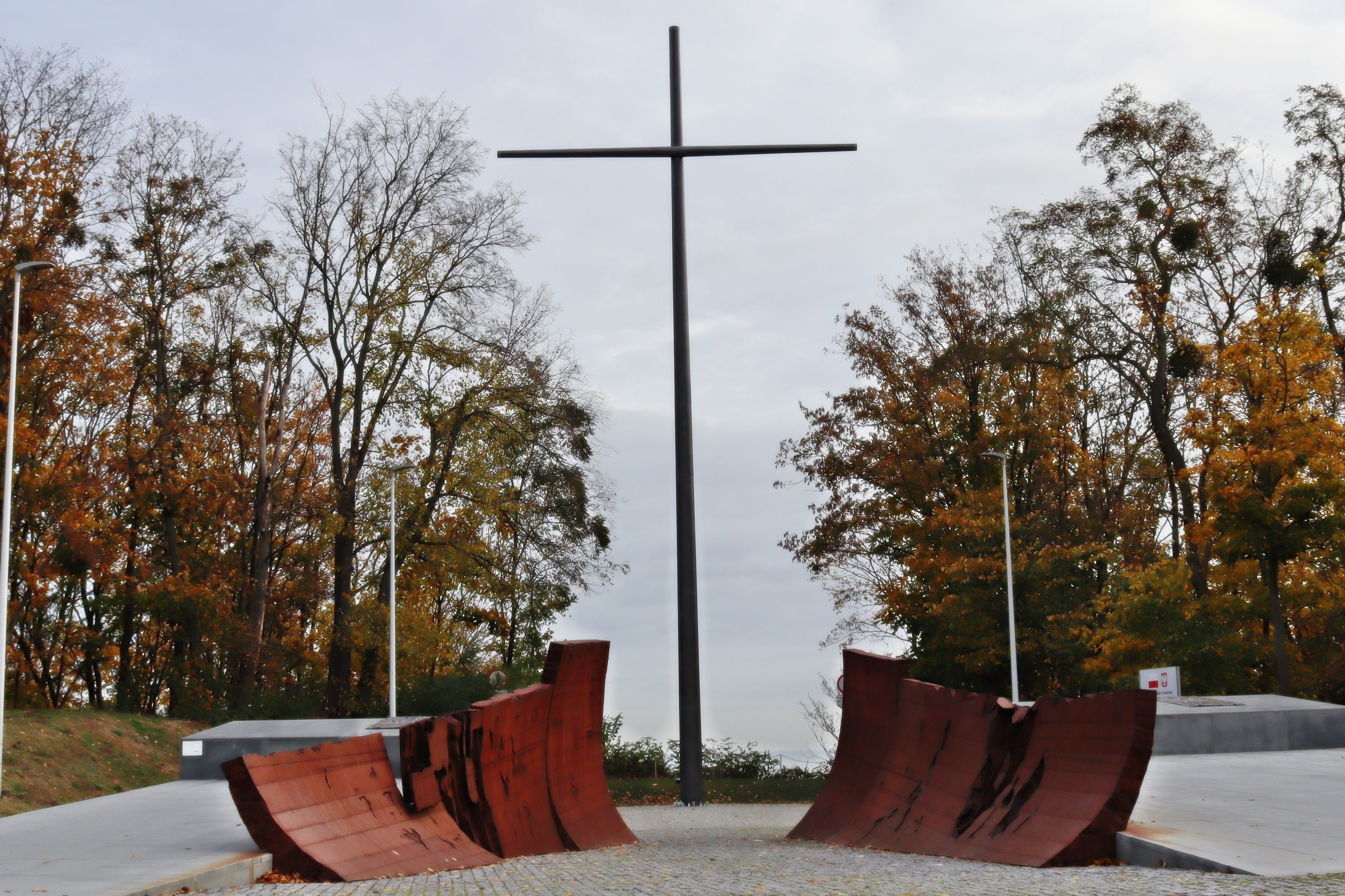 Cmentarz Marynarki Wojennej_Kwatera Pamięci_02